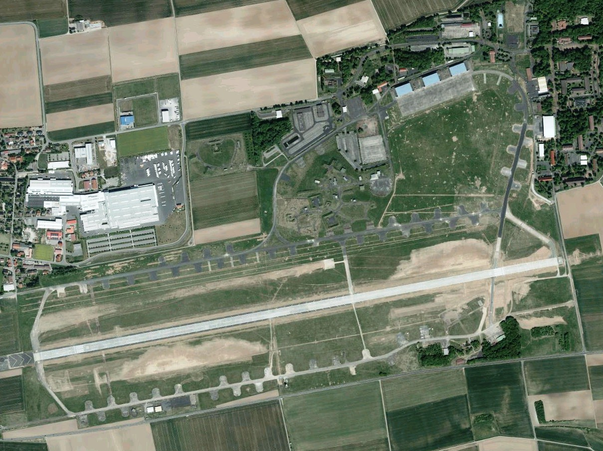 Luftaufnahme der Bayerischen Vermessungsverwaltung: Fluplatz in Giebelstadt, Landkreis Würzburg, Bayern.